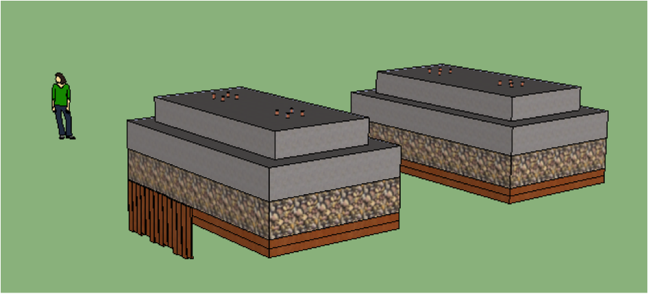 modélisation piles